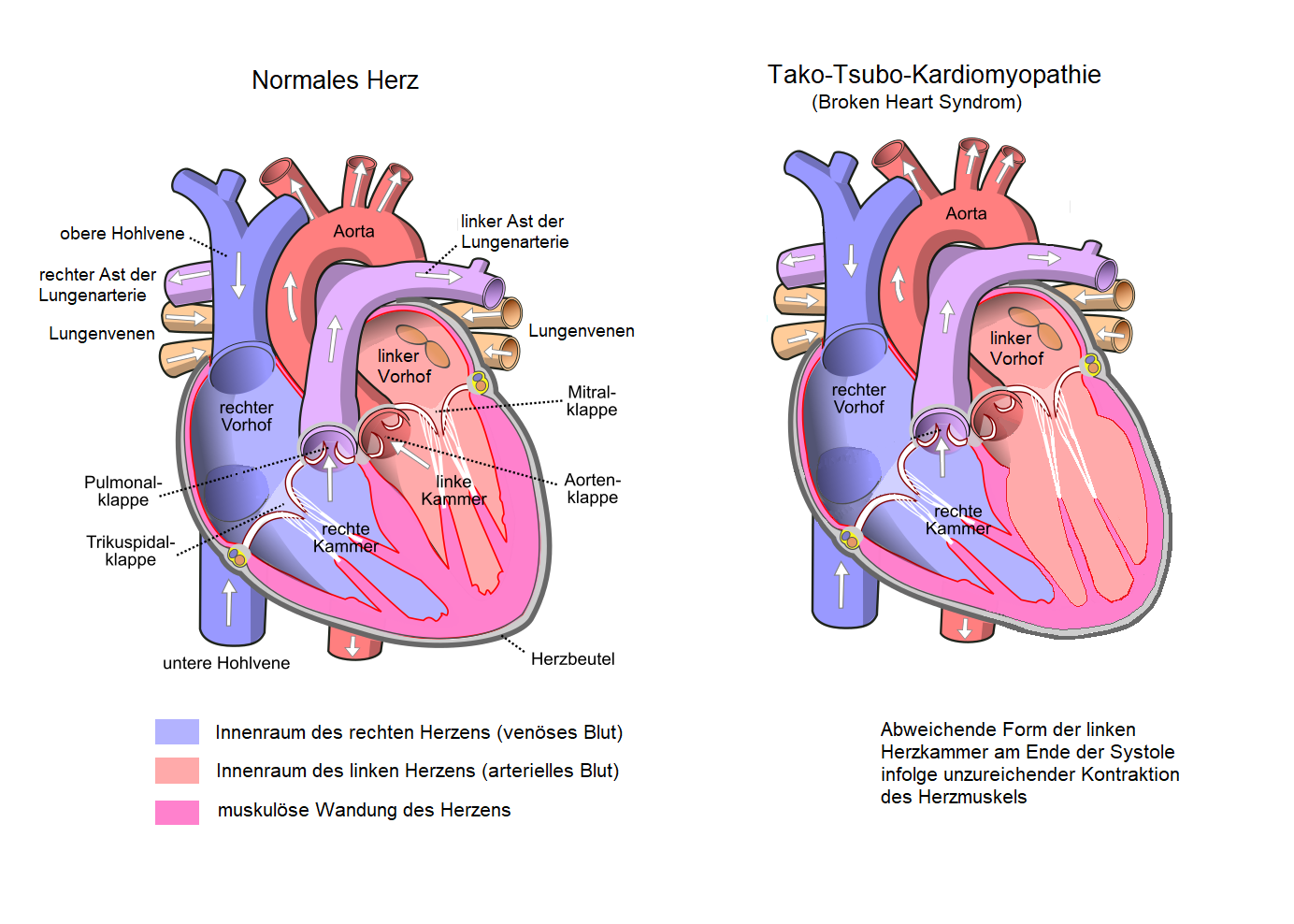 Form der linken Herzkammer normal und abweichend bei Broken Heart Syndrom